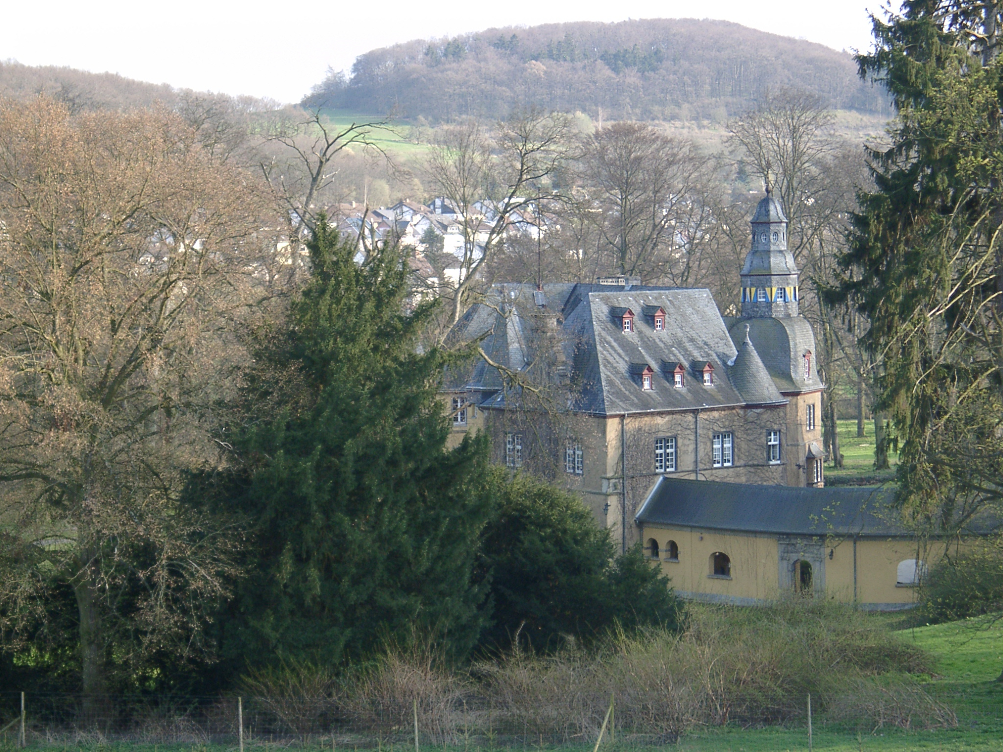 Bassenheim Schloss - selbst fotografiert (Klaus Graf) 3.4.2005 - Lizenz: CC-BY